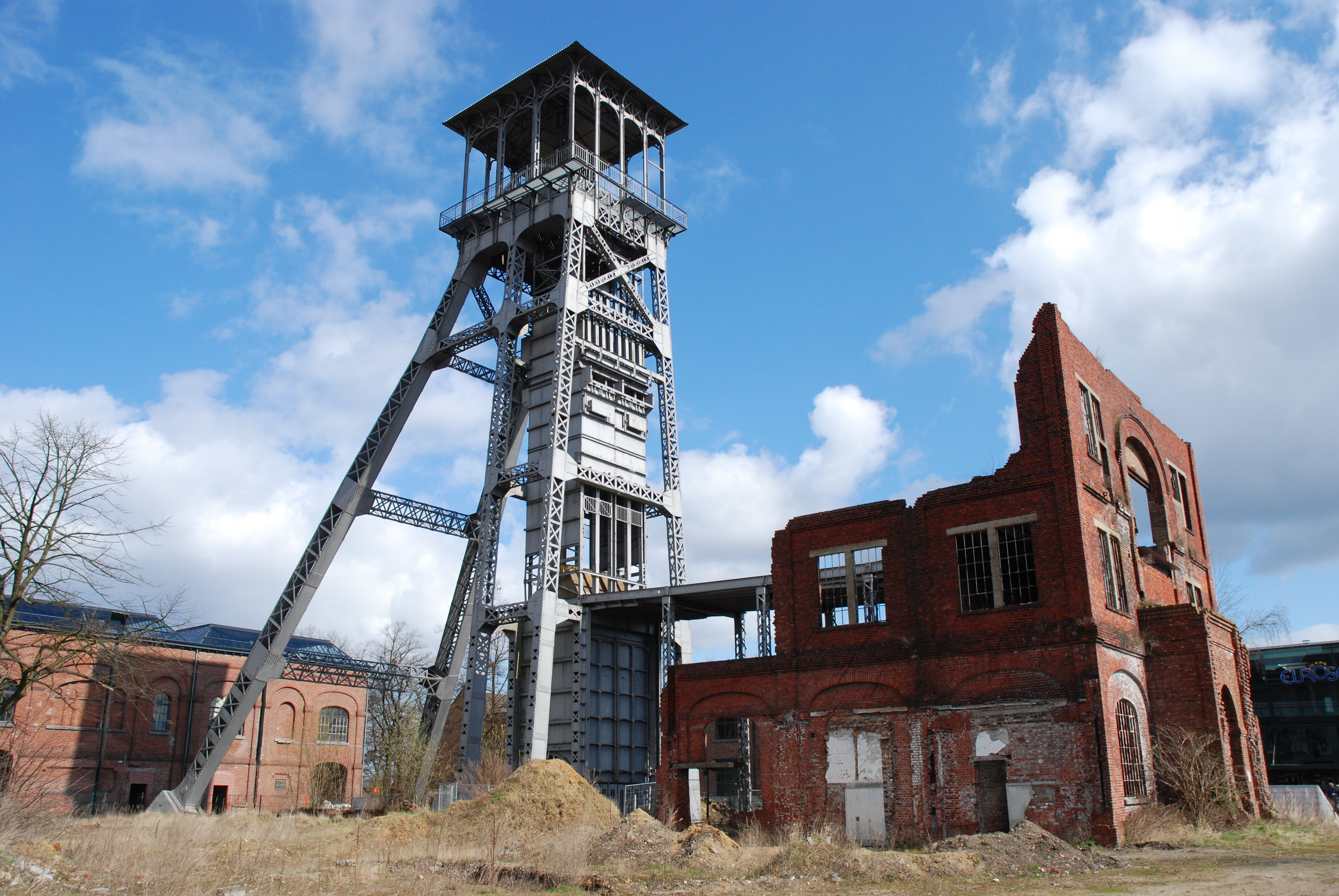 De steenkoolmijn van Winterslag, Genk, België